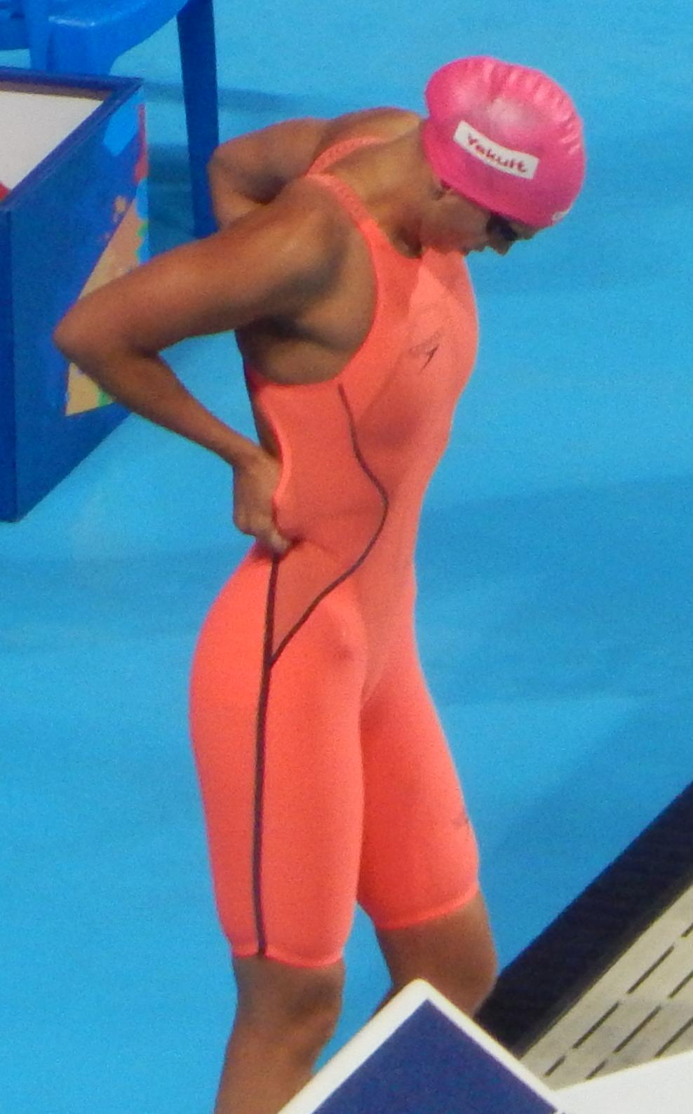 Юлия Ефимова перед триумфальным финальным заплывом на 100 метров брассом в Казани